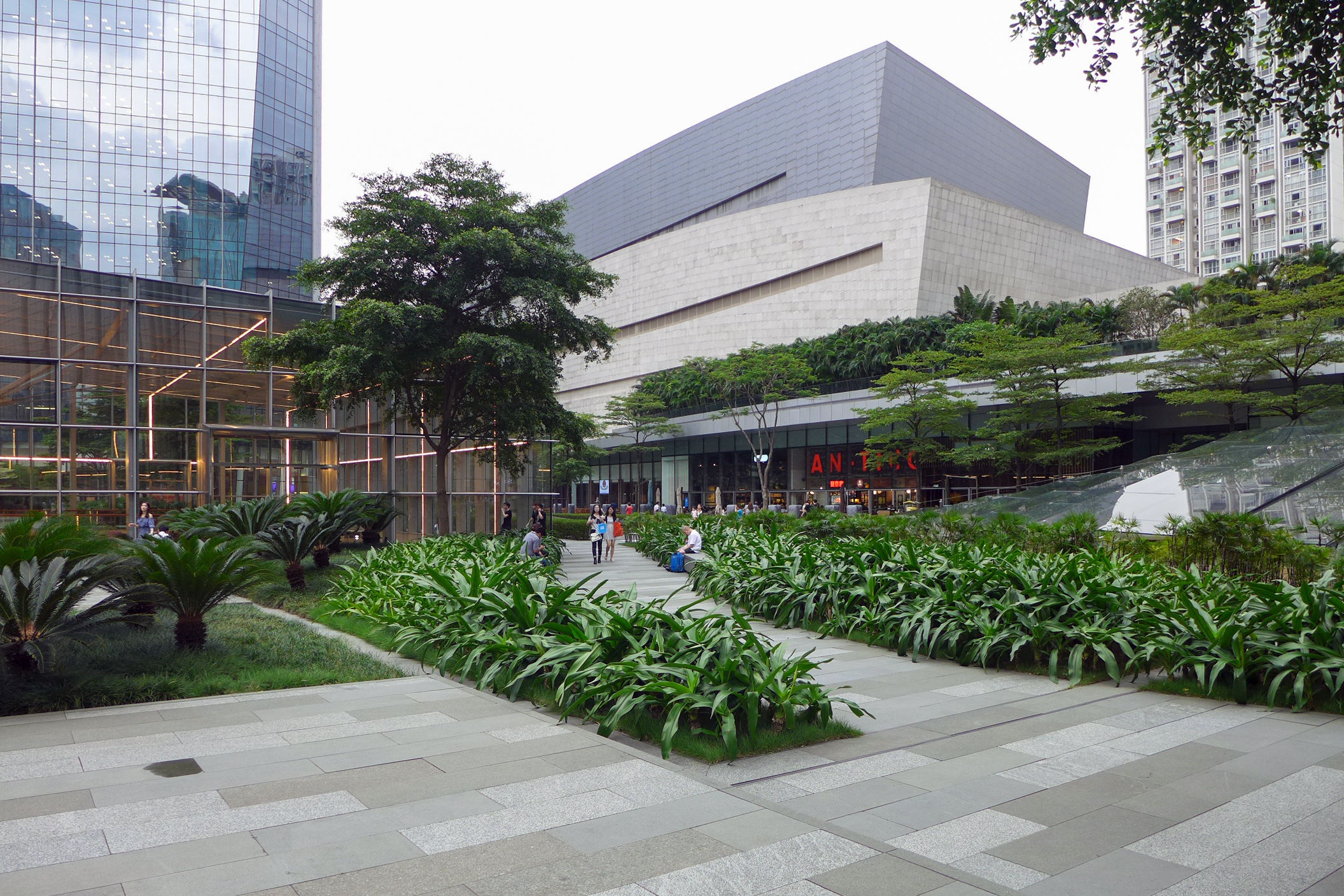 Taikoo Hui Roof garden